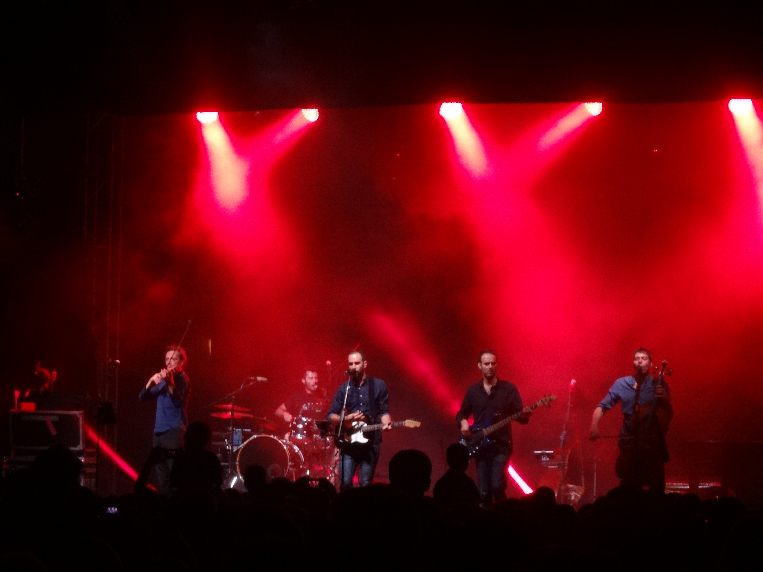 Festa Major d'Igualada, agost de 2016. Concert de Blaumut a la plaça de l'Ajuntament